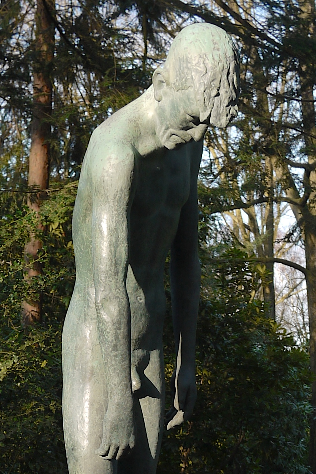 "Zusammenbrechender" von Hermann Lickfeld, auf dem Ehrenfriedhof in Mülheim an der Ruhr This is a photograph of an architectural monument.